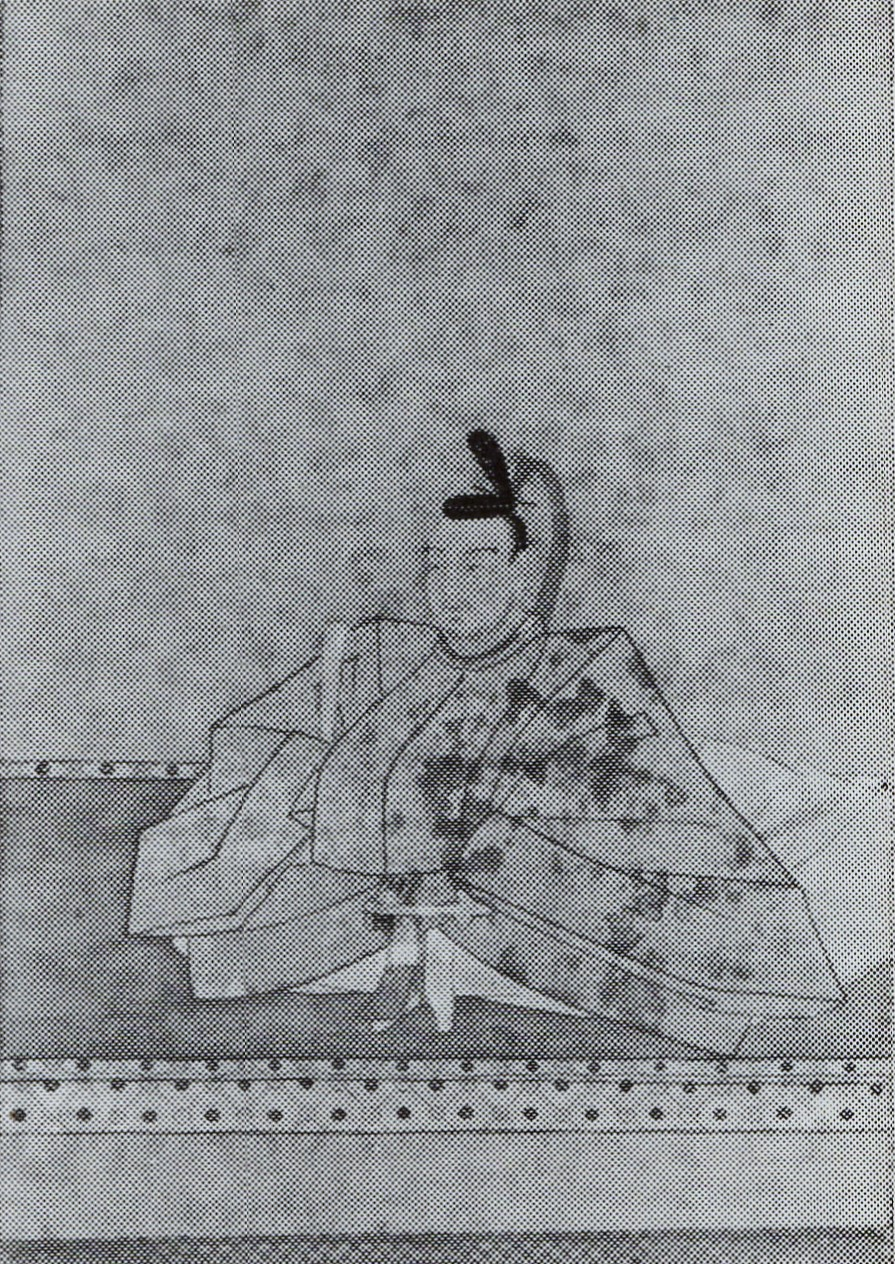 相良頼福の肖像(モノクロ)。